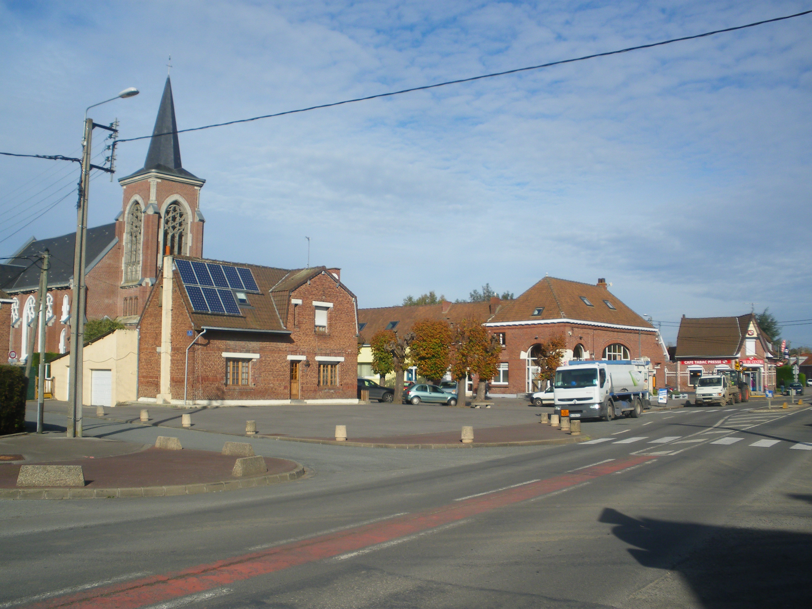 Centre de la commune de Neuve-Chapelle.